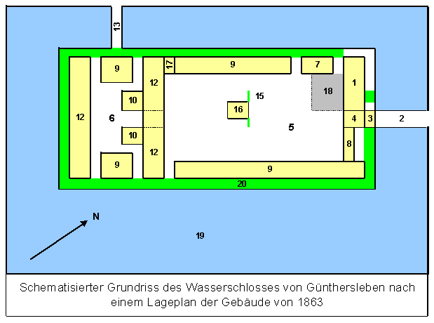 Lageplan der Gebäude des ehem. Wasserschlosses in Günthersleben